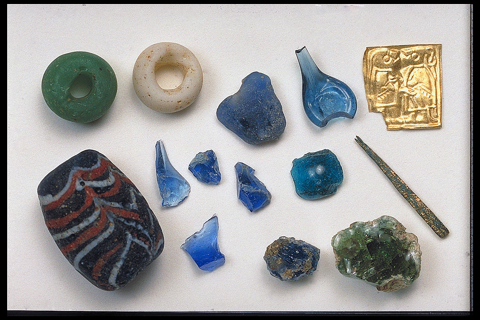 Lösfyndssamling från februari 2002 från Slöingeboplatsen (RAÄ-nummer Slöinge 114:1) i Slöinge socken, Årstads härad, Falkenbergs kommun, Halland, Hallands län, Sverige.